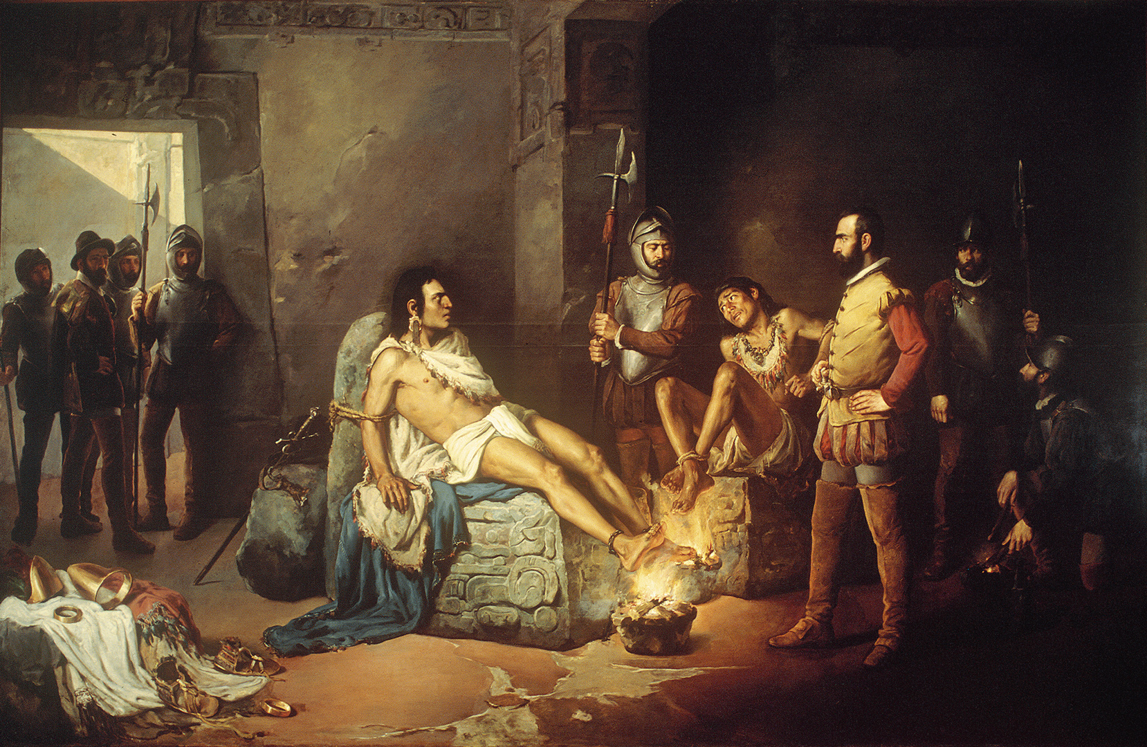 El suplicio de Cuauhtémoc, 1892. Óleo sobre tela, 294.5 x 454 cm. Museo Nacional de Arte.